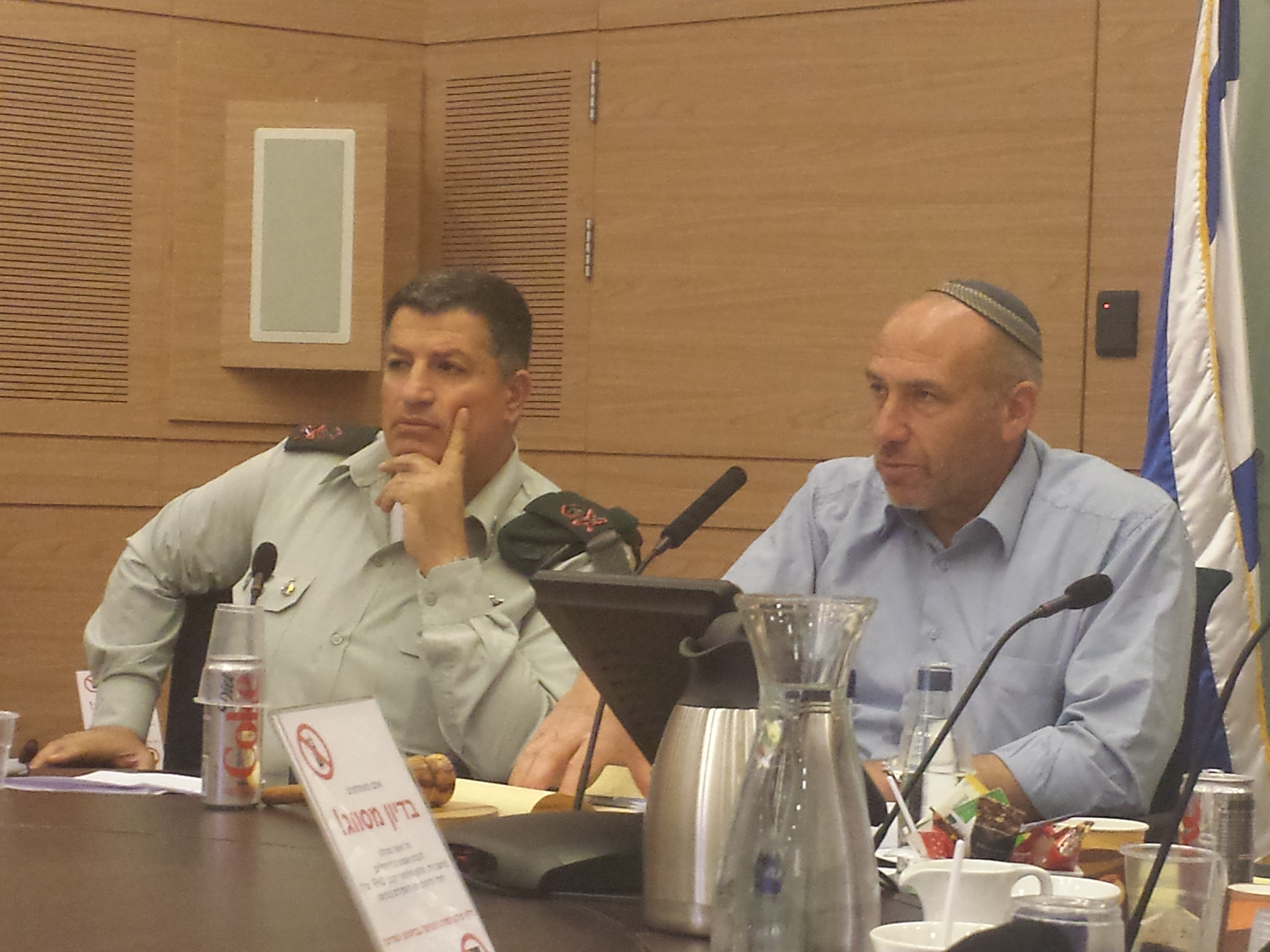 בדיון בועדת חוץ וביטחון עם מתאם הפעולות בשטחים האלוף יואב (פולי) מרדכי